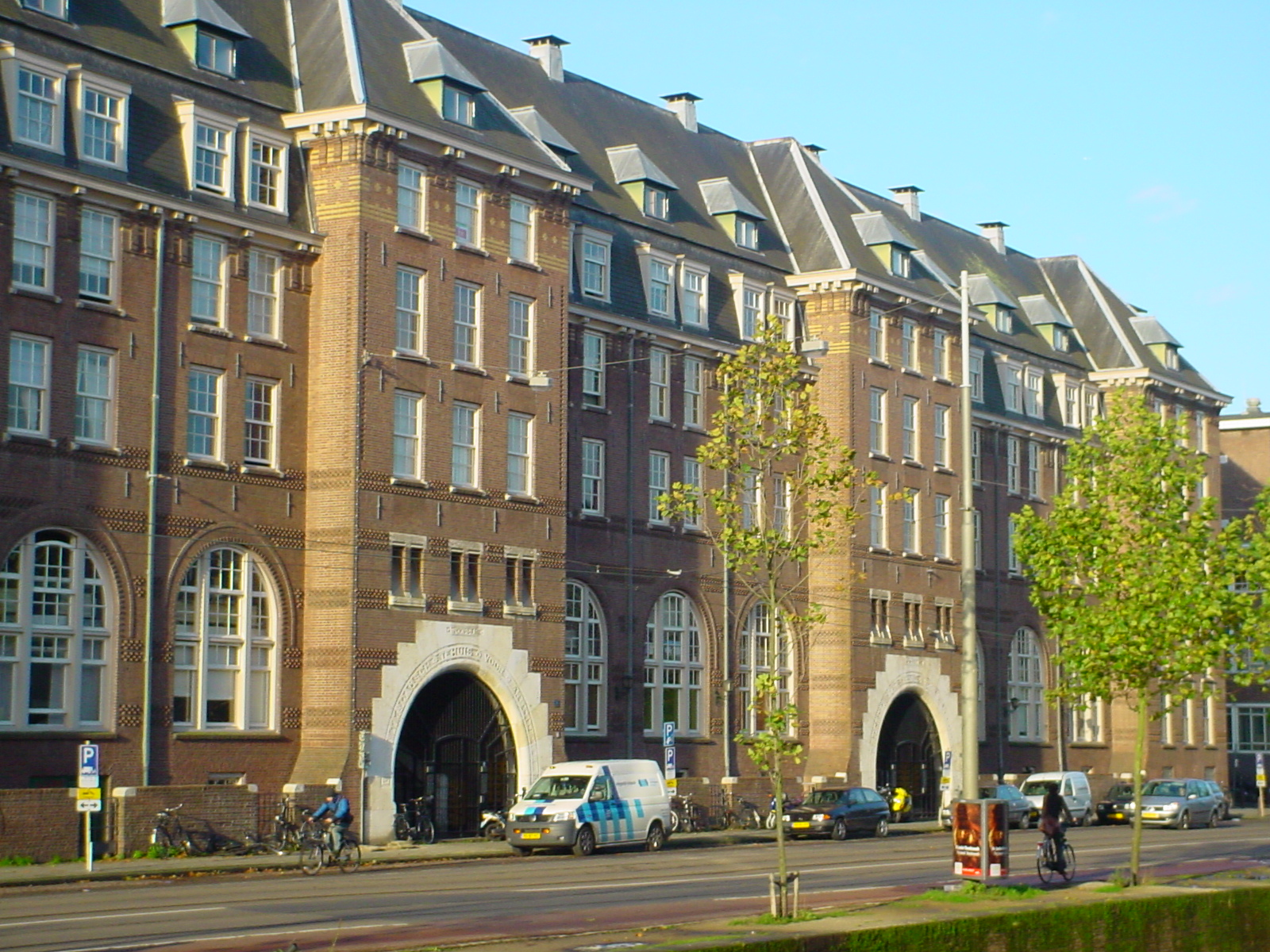 Amsterdamsch Tehuis voor Arbeiders (ATVA), Marnixstraat 266-340 Amsterdam. Architect Jan Ernst van der Pek, gebouwd 1916-1918. Het gebouw biedt plaats aan 350 bewoners en bestaat uit vier vleugels met haaks daarop aan de straatkant drie verbindingsstukken, vijf verdiepingen tellend. De begane grond bevat de voor gemeenschappelijk gebruik bestemde ruimten. Het rechtergedeelte bestaat uit eetzalen en een keuken, het middengedeelte bevat een schrijf- en een leeskamer en een kantoor. Het A.T.V.A. is gebouwd in een sobere, monumentale stijl, en het straalt een zekere rust uit. Het gebouw kan gezien worden als de bekroning op Van der Peks streven naar een maatschappelijk geëngageerde architectuur. Het A.T.V.A. vond navolging in Den Haag en Groningen en genoot zelfs bekendheid in het buitenland. Het was het eerste tehuis voor alleenstaanden in Amsterdam.Het is gerenoveerd in 1979 en is nu bestemd voor bejaardenwoningen en sociale woningbouw.